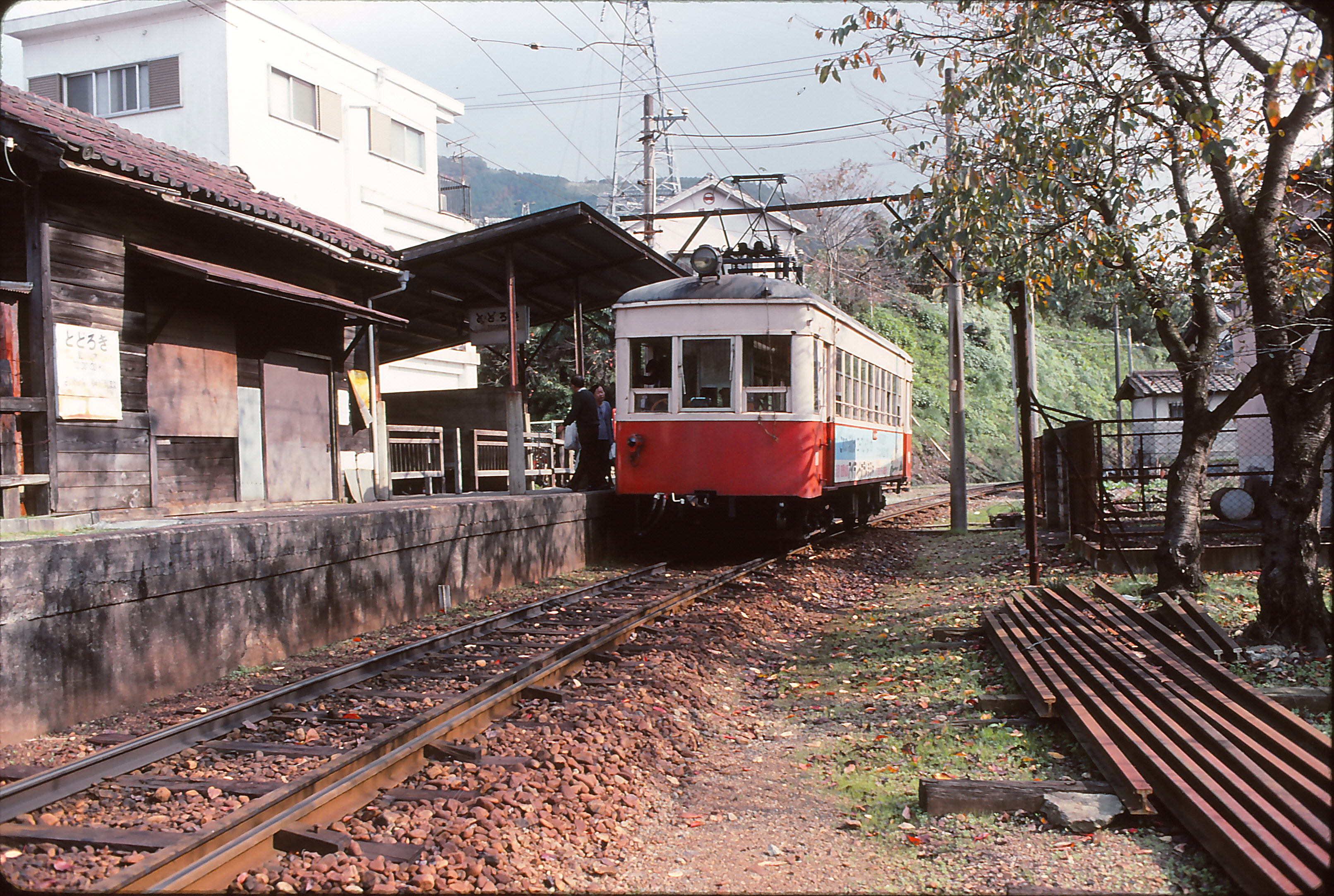 野上電気鉄道 動木駅